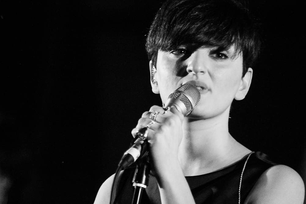 Arisa in concerto a Brescia durante l'Amami Tour 2012